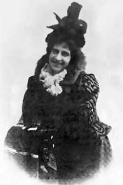 Angelica Pandolfini, soprano, 1902